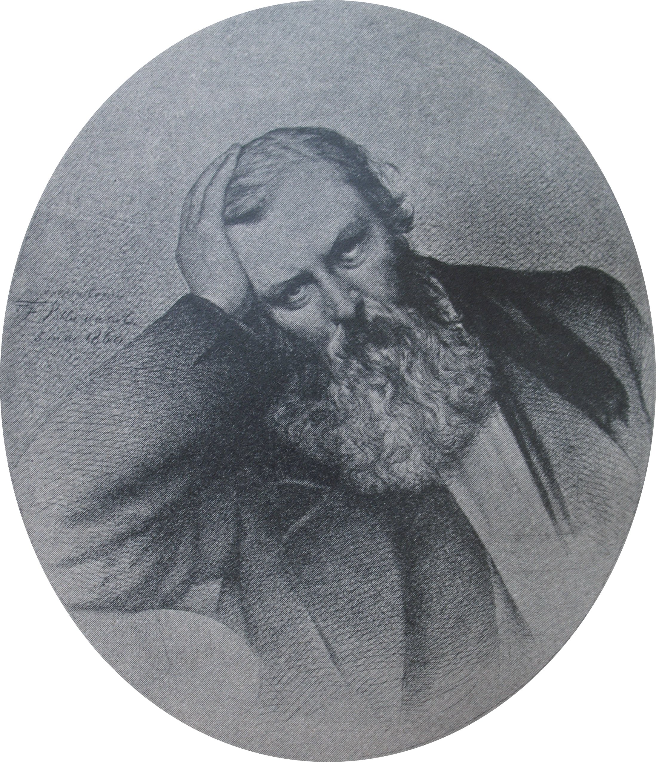 Ritratto di Paolo De Flotte, 1860, litografia.